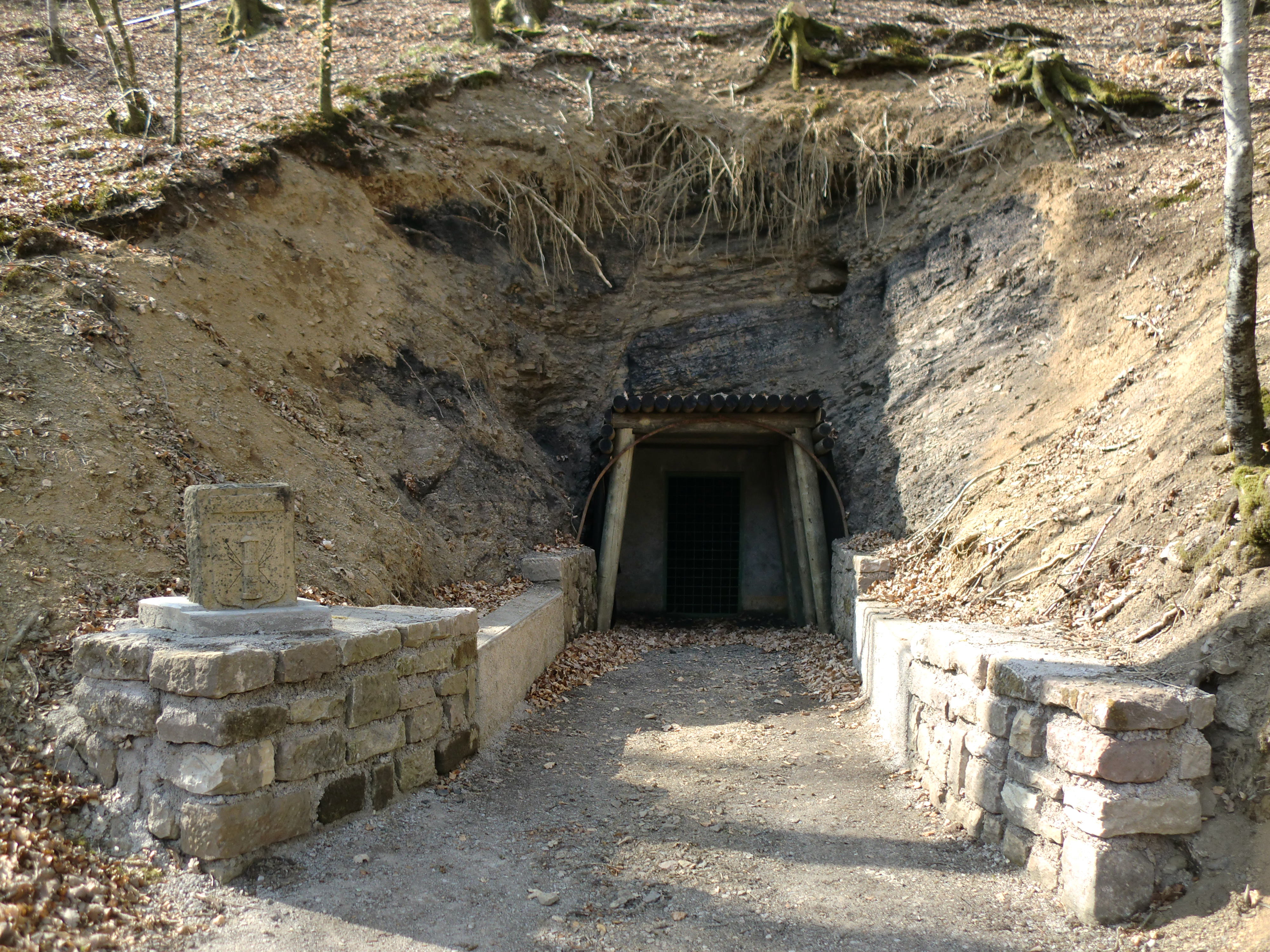 La galerie Datout des Houillères de Ronchamp. Mise en exploitation de 1950 à 1958. Elle est aménagé et sécurisée par les amis du musée de la mine de 2011 à 2012.